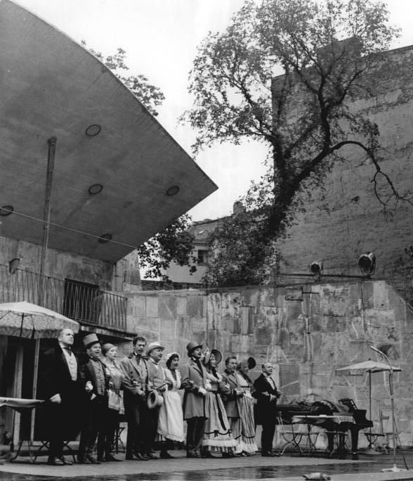 Berlin, Prater, Sommertheater Zentralbild Franke 17.7.1965 Sommertheater im Berliner Prater vor Premiere. Besseres Wetter für die Premiere wünschen sich die 10 meist freiberuflich tätigen Schauspieler. Hier noch bei der Generalprobe im Regen, die mit dem Volksstück über Madame Gräbert, eine legendäre Figur aus dem Altberliner Theaterleben im Berliner Sommertheater im Prater, der traditionellen Erholungsstätte der Berliner, auftreten.